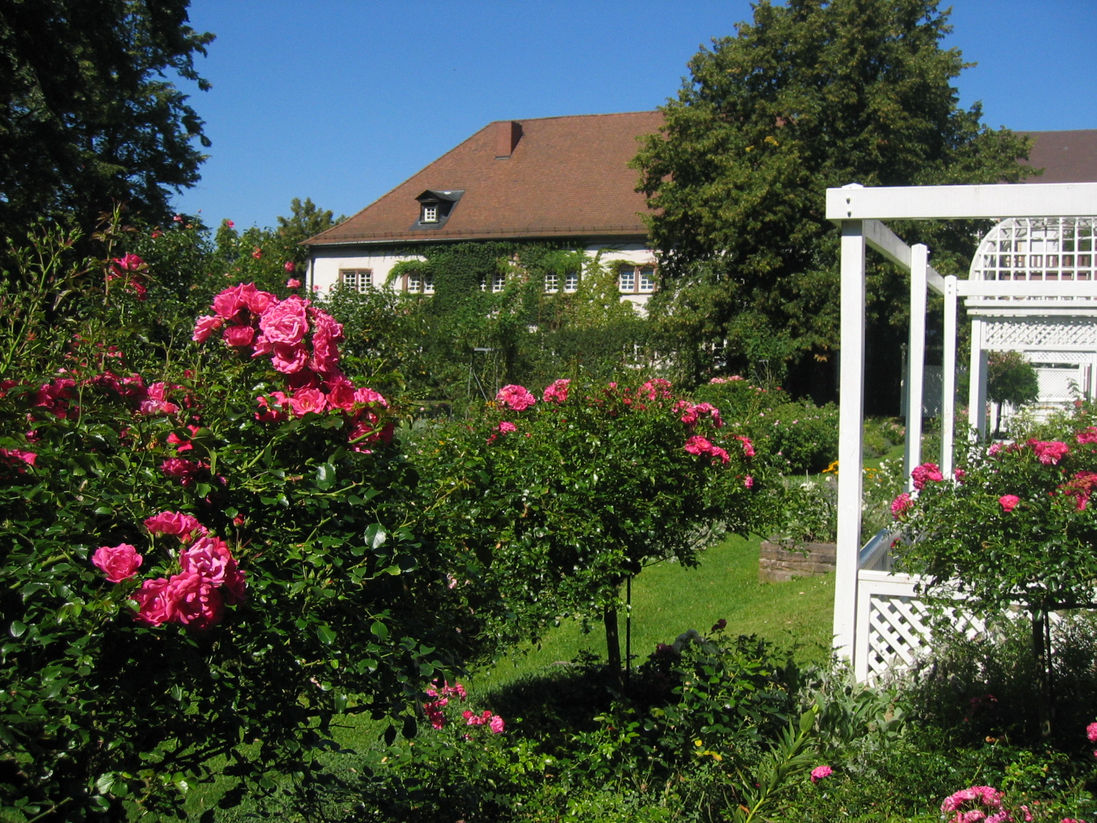 Rose garden behind the castle of Ettlingen, Baden-Württemberg